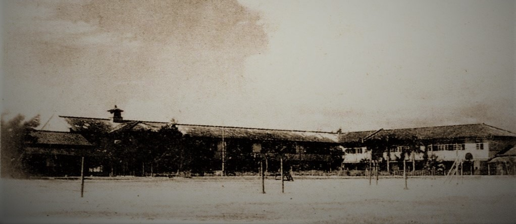 中文（台灣）: 台中二中史料